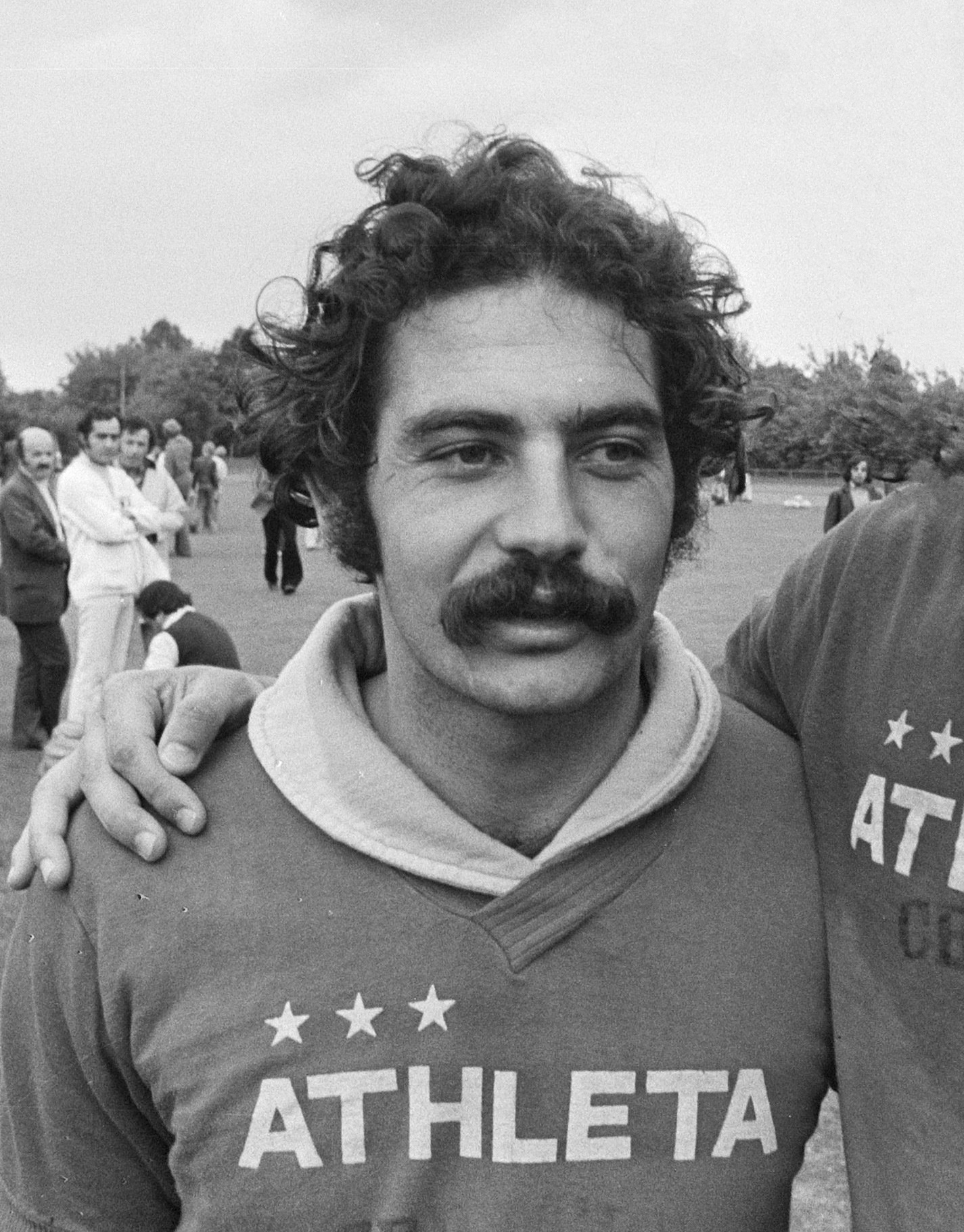 WK 74, training Brazilie; Roberto Rivelino (links)